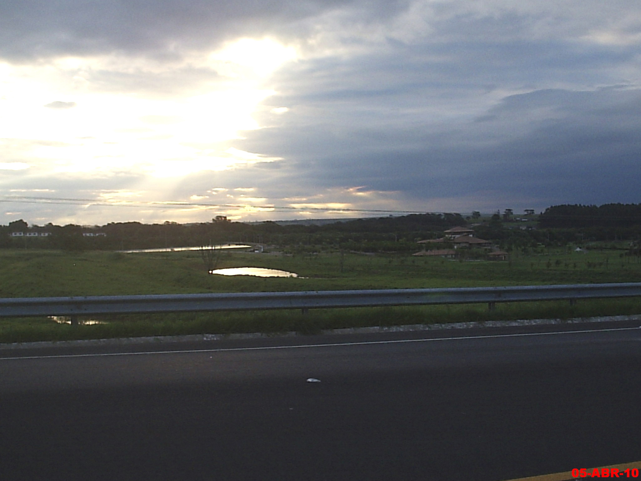 Entardecer, vendo ao fundo o Parque Eco-Esportivo Dahma - SP-318 - São Carlos